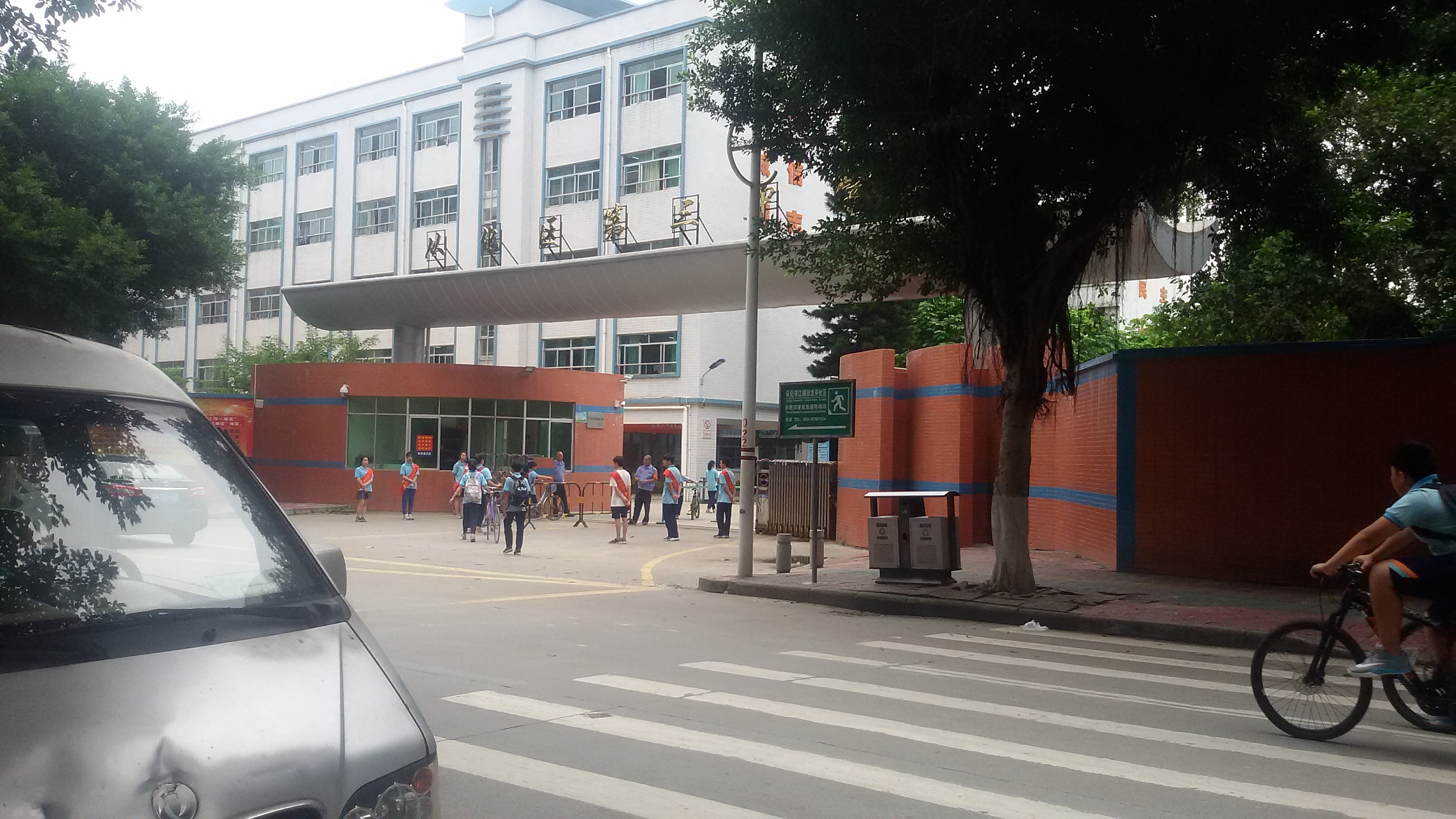 粵語: 從化區第三中學嘅大門